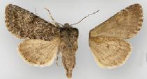 Lasionycta subalpina female